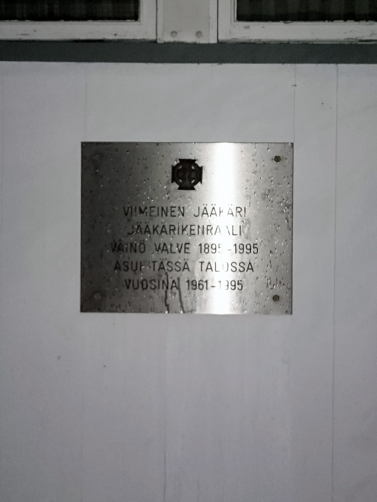 Muistolaatta viimeisen jääkärikenraalin ja Merivoimien entisen komentajan Väinö Valveen viimeisessä talonyhtiössä, osoitteessa Oravatie 49, Helsinki.